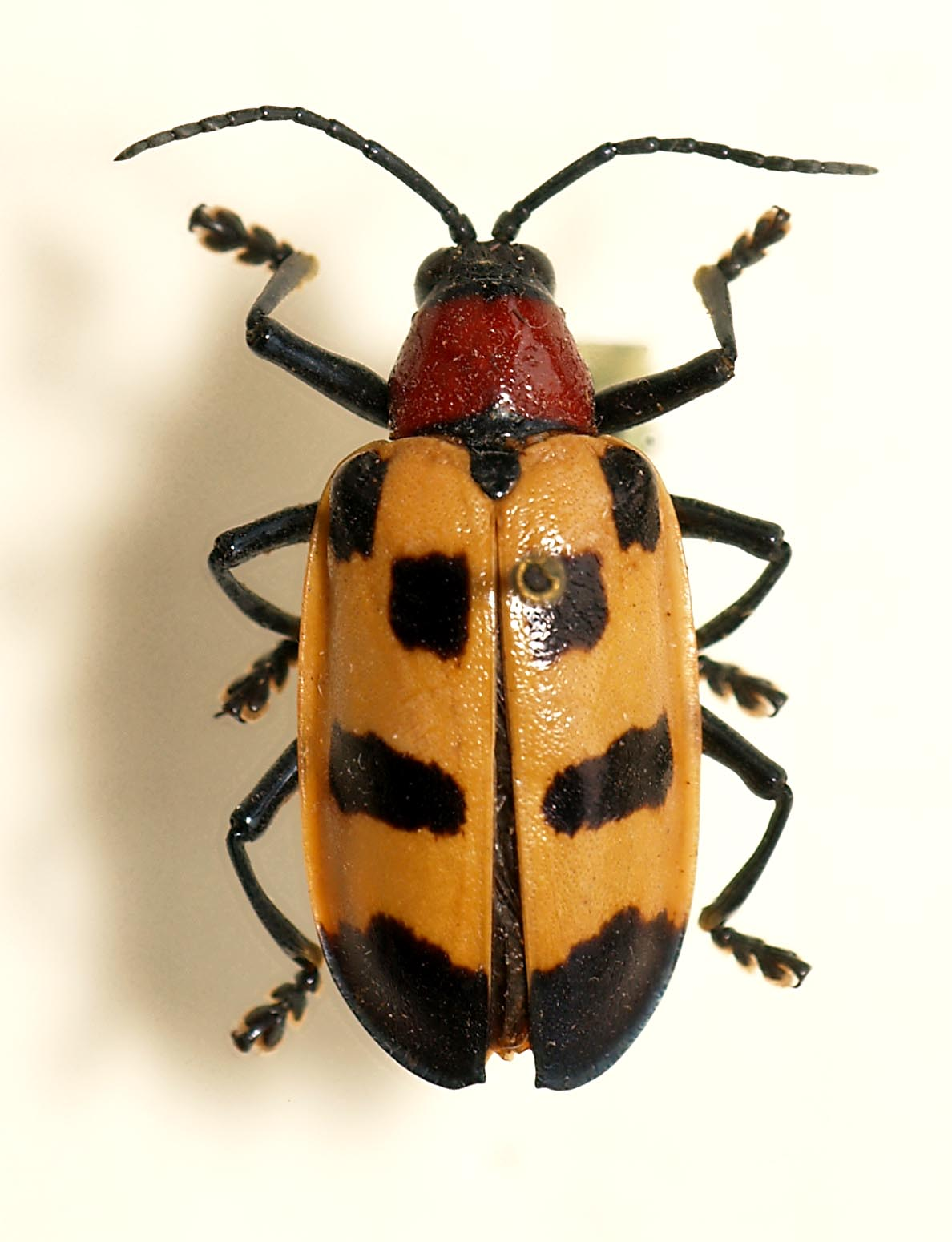 Alurnus ornatus